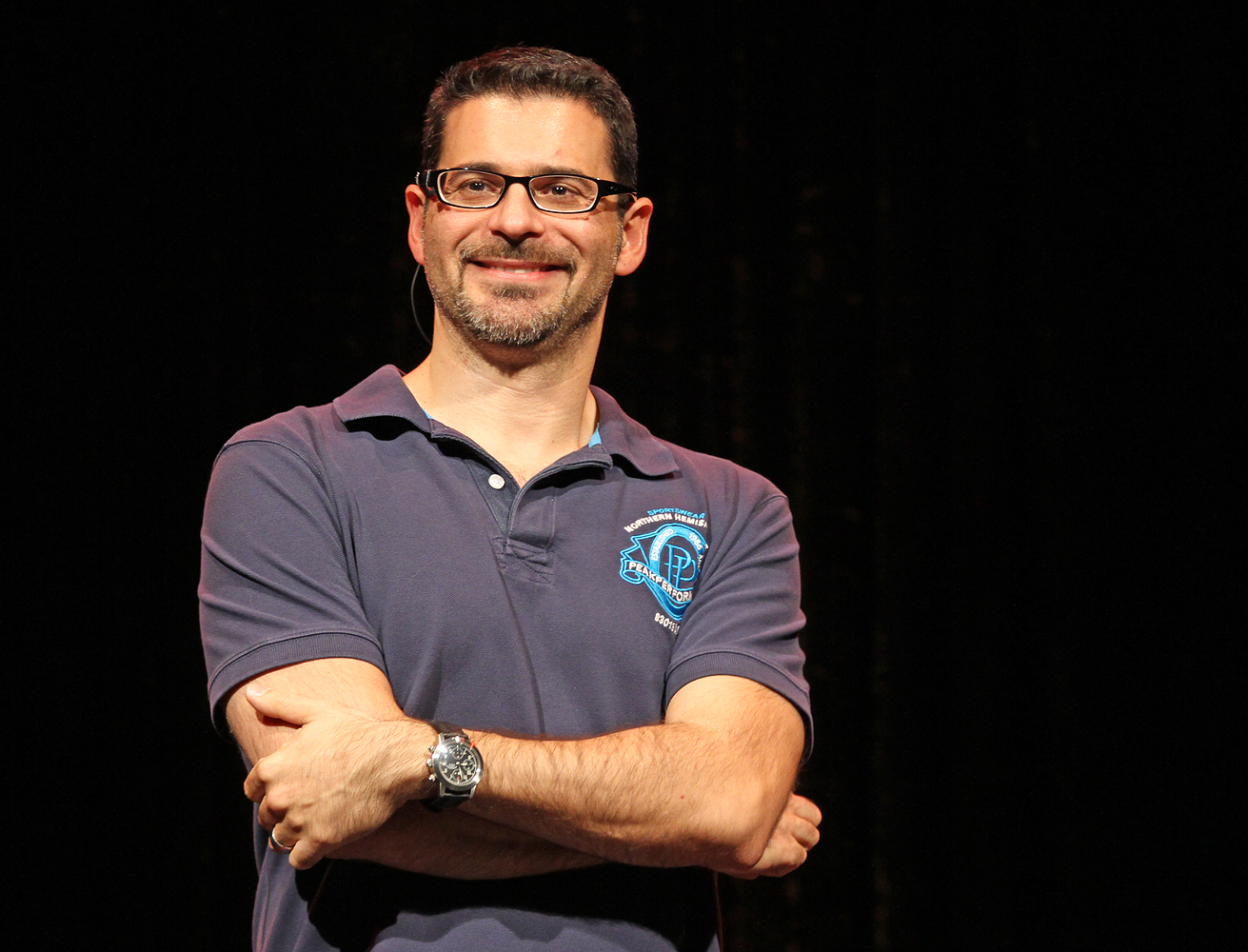 Rick Kavanian, Schauspieler bei einem Liveauftrit seines Stückes Ipanema in der der Comödie Fürth, 26.10.2011, Foto: Stephan Kohler (